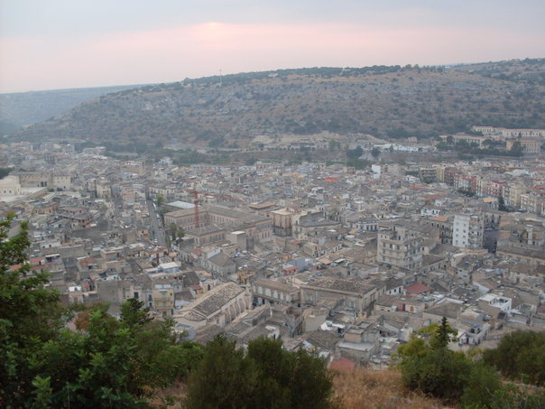 Provincia de Noto en la Isla de Sicilia - Italia (2009)